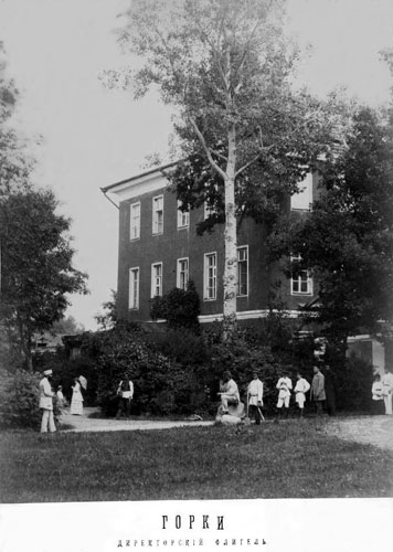 Беларуская (тарашкевіца): Горкі (Horki). Акадэмія. Дырэктарскі флігель